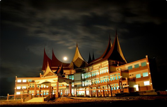 KantorBupatiKab50Kota